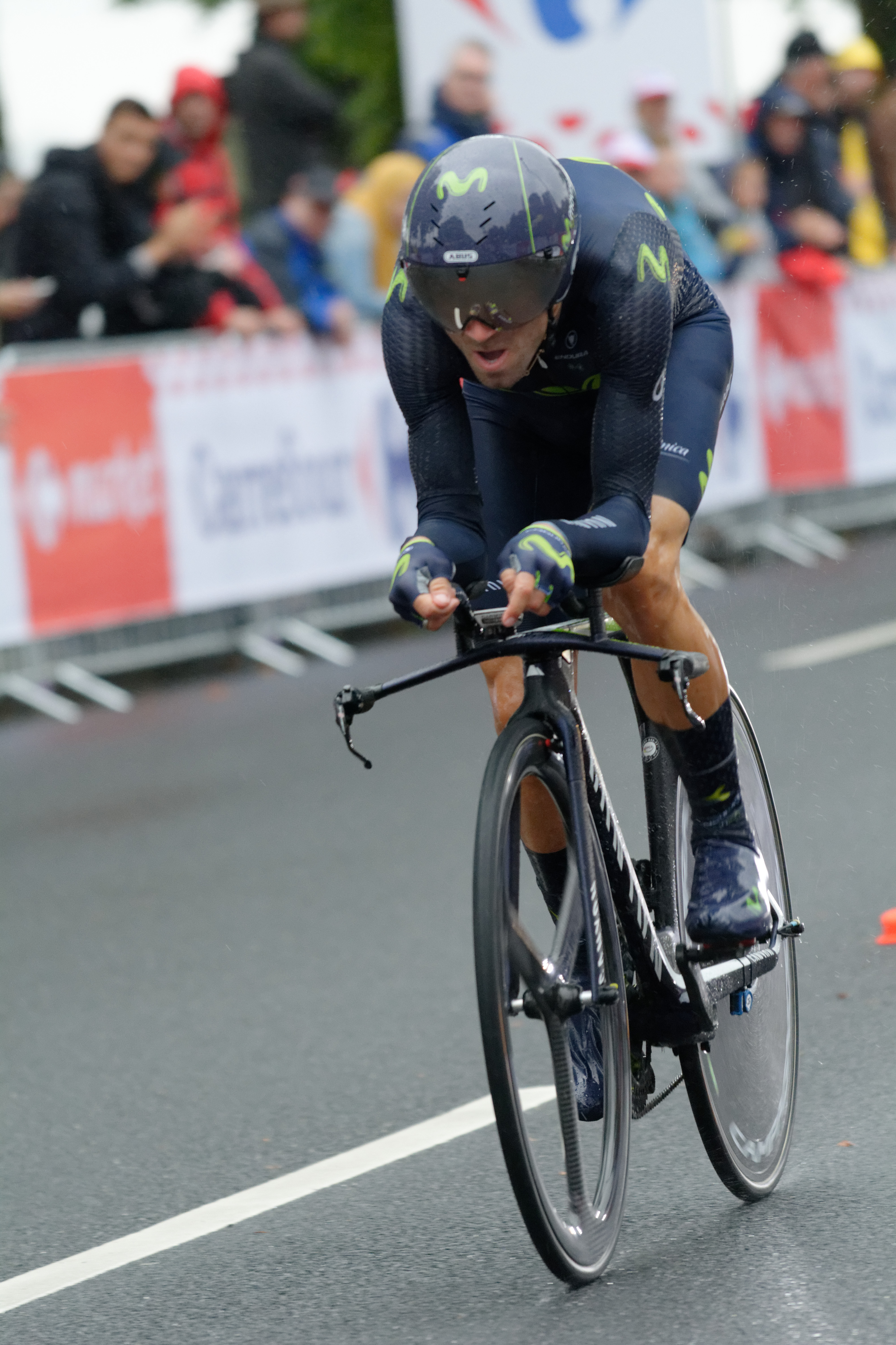 Tour de France 2017 Stage 1 Duesseldolf